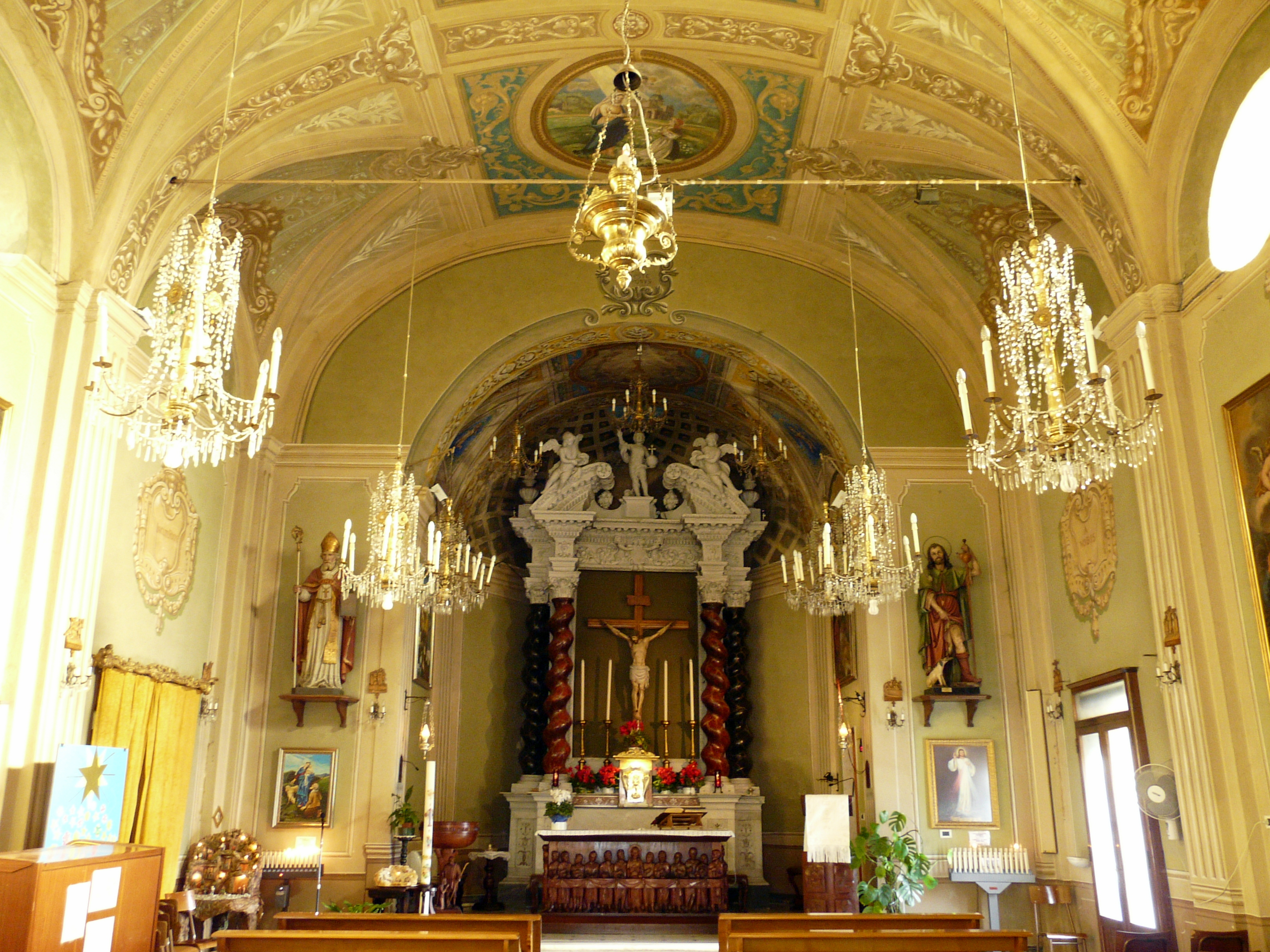 La chiesa di San Rocco a Recco, Liguria, Italia